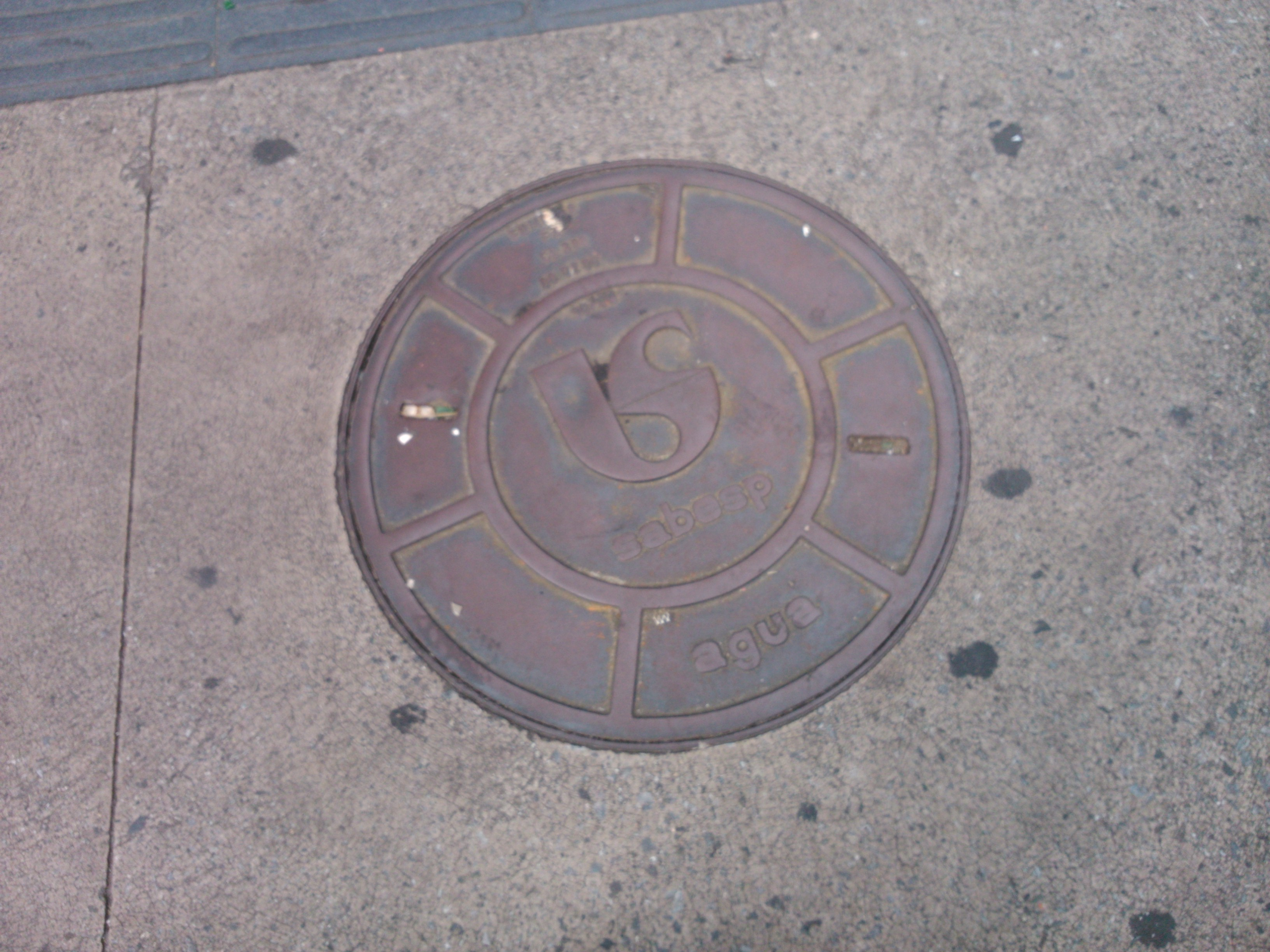 Bueiro da Sabesp na Avenida Paulista